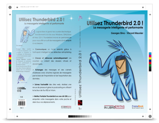 Couverture réalisée par Alexandre Mory du livre "Utilisez Thunderbird 2.0 !" de Georges Silva et Vincent Meunier dans la collection de livres libres Framabook.